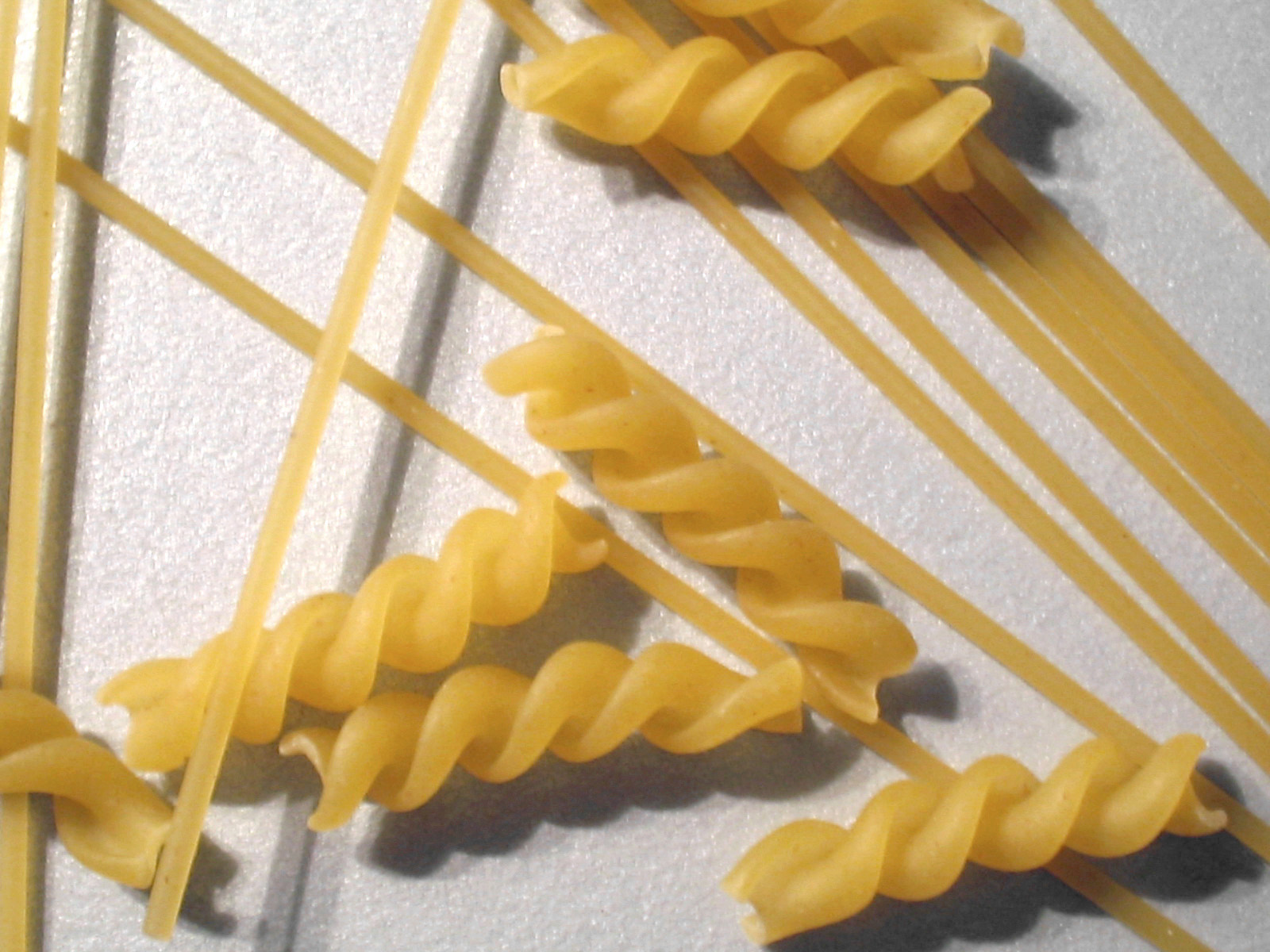 pasta, not cooked